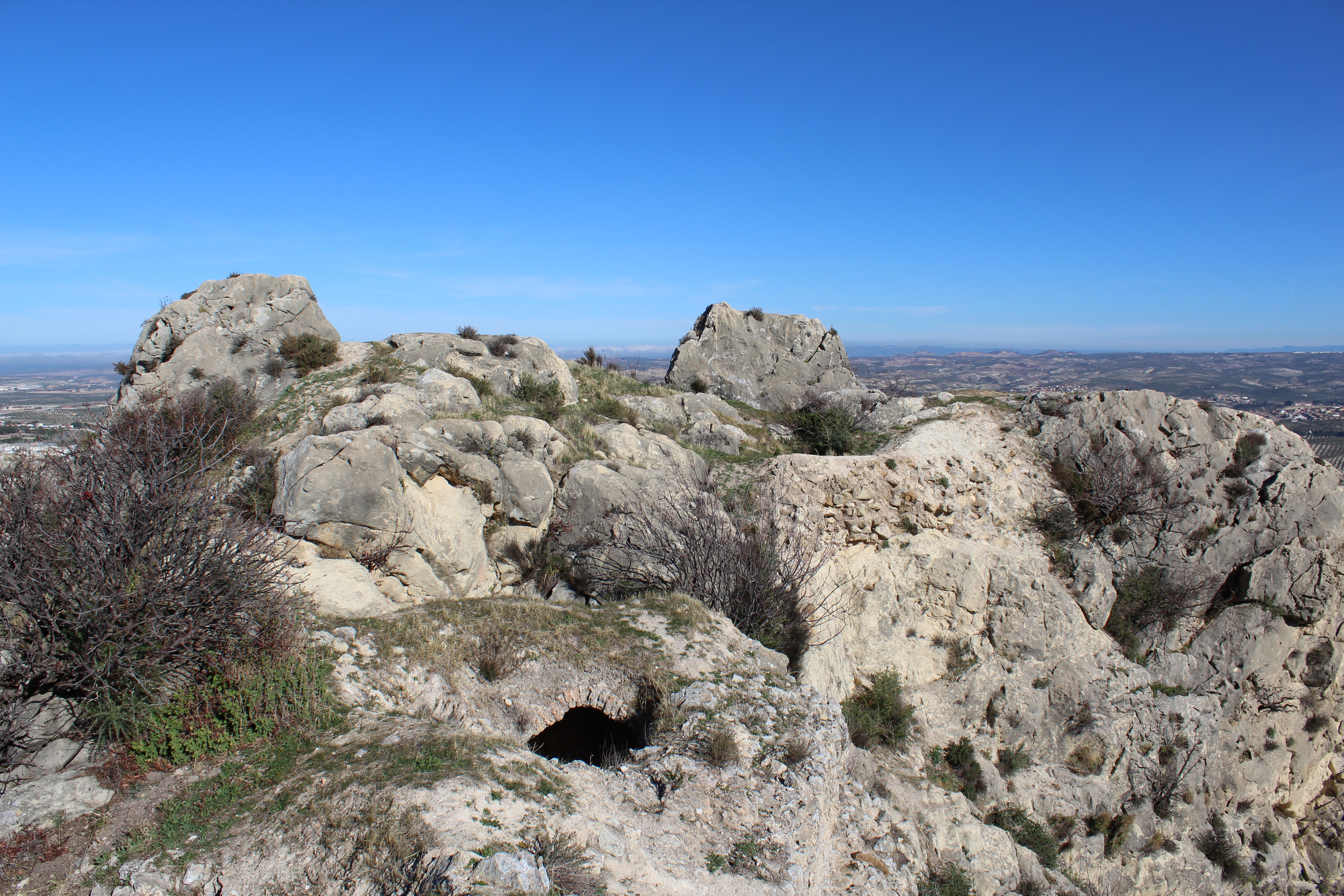 Cumbre del cerro Zumbel, donde se encuentra el Castillejo homónimo.